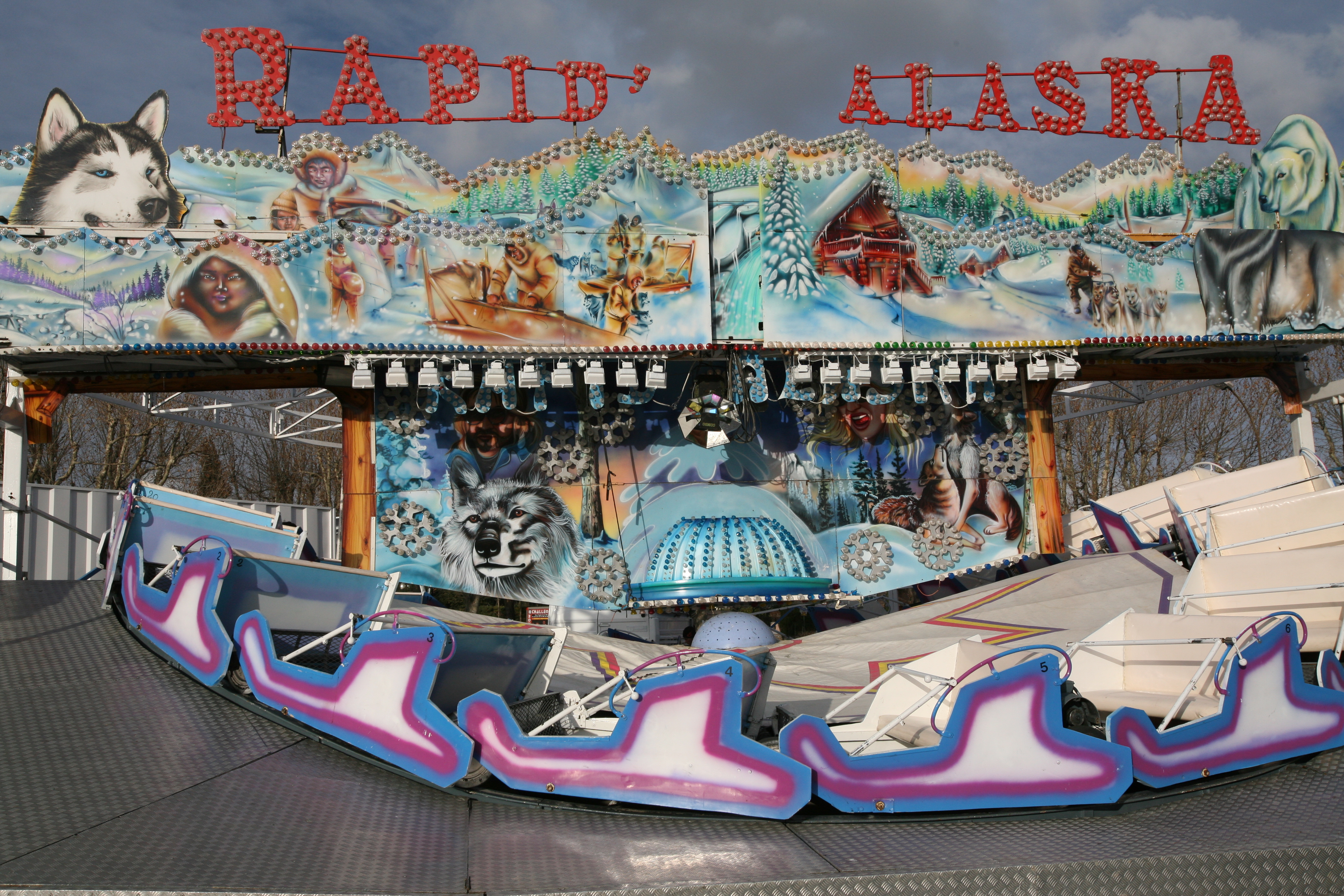 Fête Foraine, Gardanne, Février 2006 Photo personnelle Auteur : Oscar J. Marianez